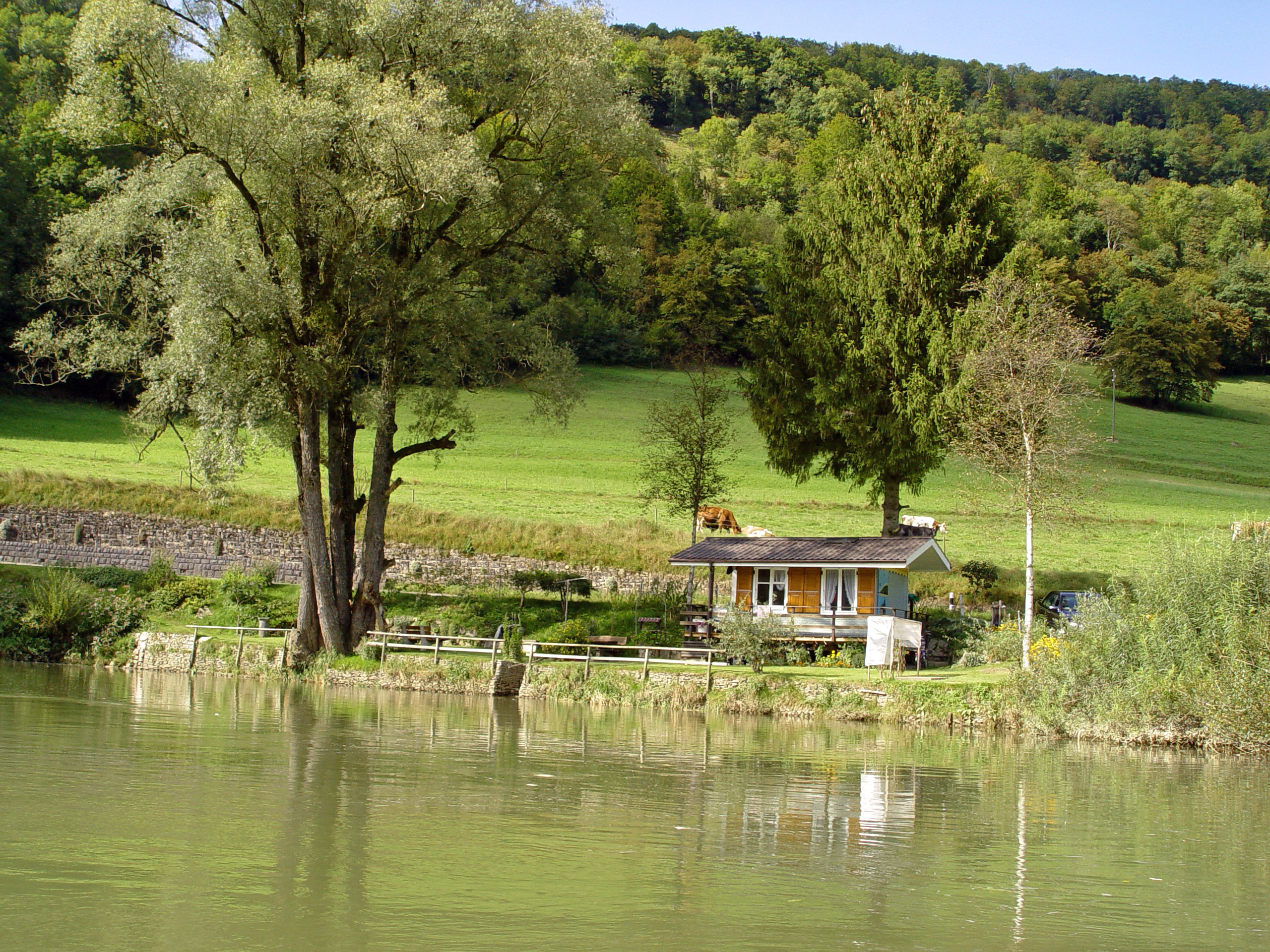 Haus direkt am Ufer von Le Doubs bei Ocourt